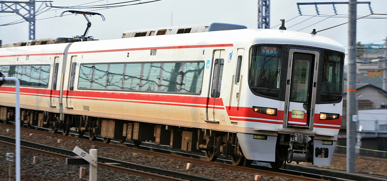 Meitetsu Panorama Super 1600 series EMU ( Ku 1602, between Kanayama Stn. and Jingū-mae Stn. )